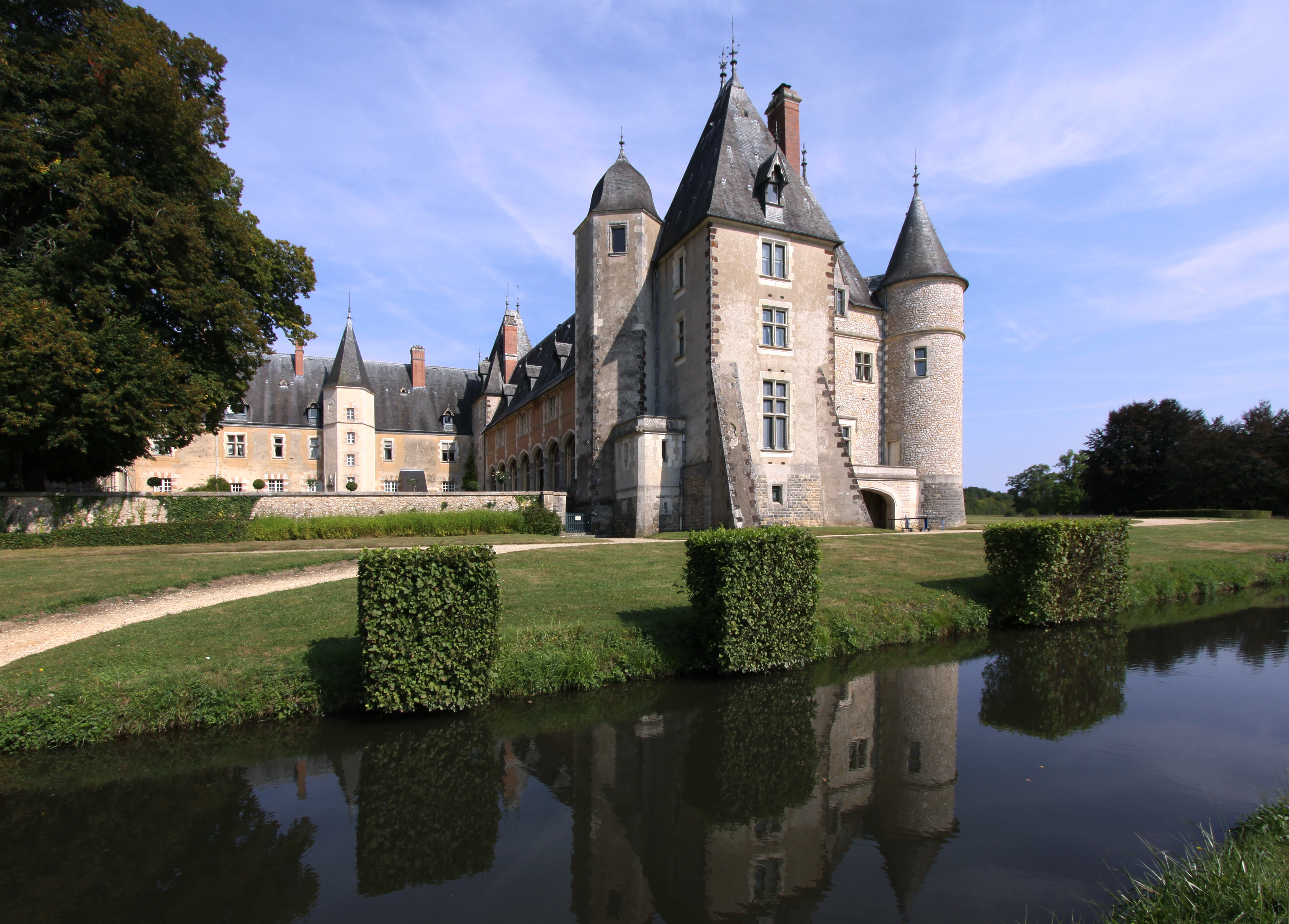 Schloss La Verrerie im französischen Département Cher - Blick in den nach einer Seite hin offenen Schlosshof